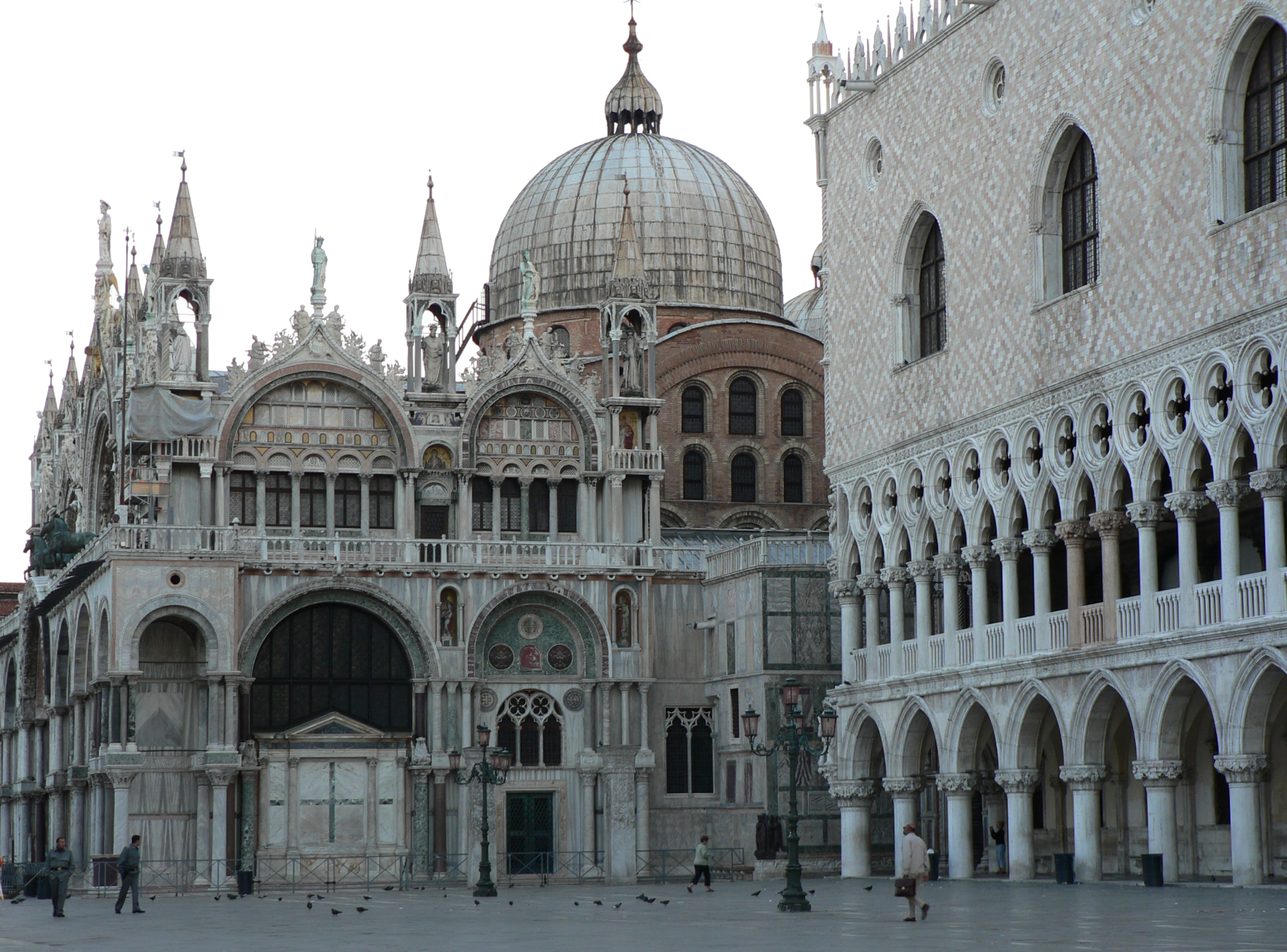 Venise (Italie), la basilique (le matin). 1870s. Today.